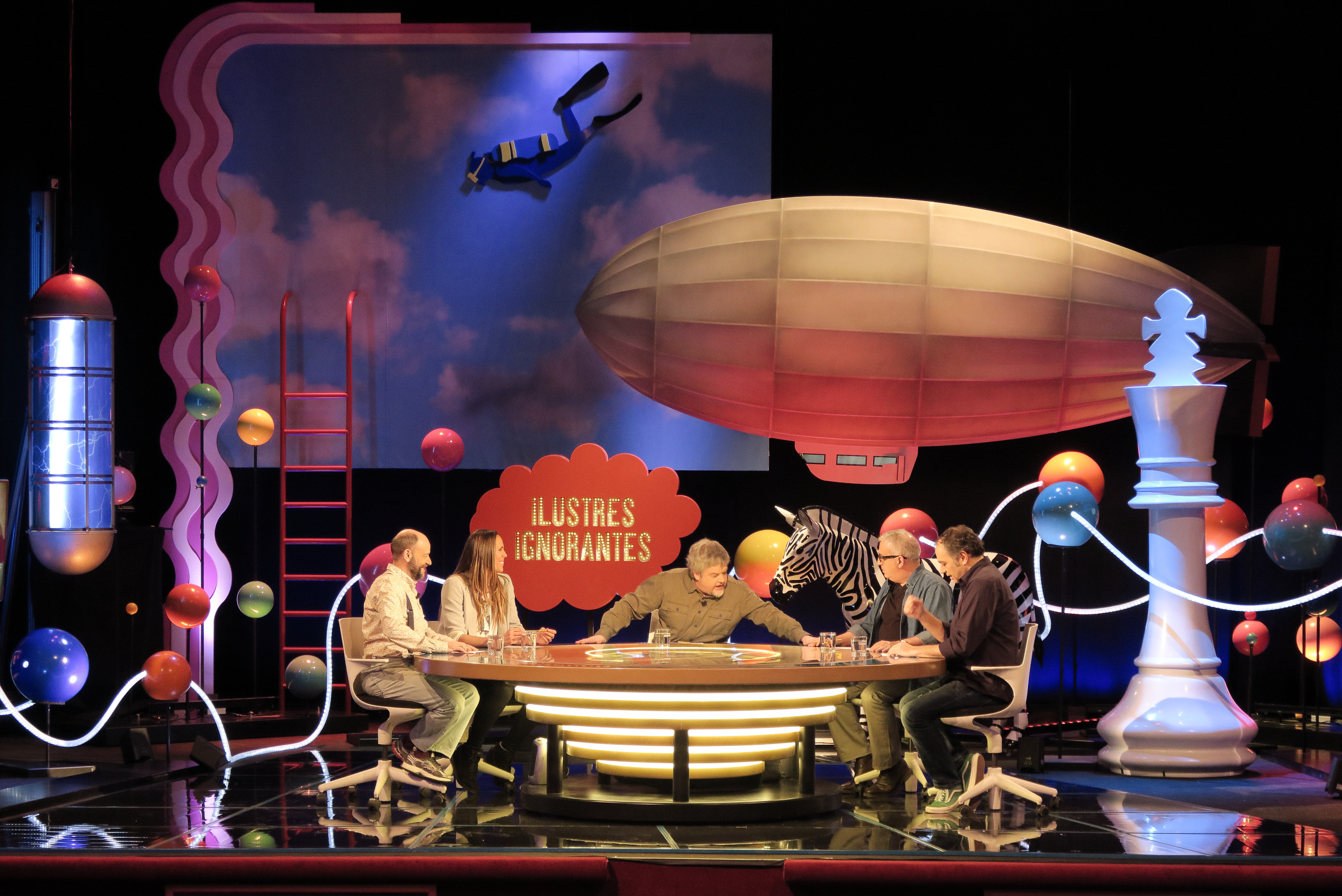 Ilustres ignorantes, Programa nº 9 (2016) con Javier Cansado, Amaya Valdemoro, Javier Coronas, Leo Harlem y Pepe Colubi